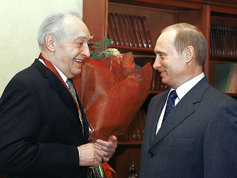 Вячеслав Тихонов